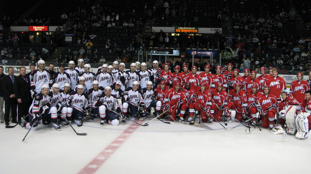 2010 AHL All-Stars